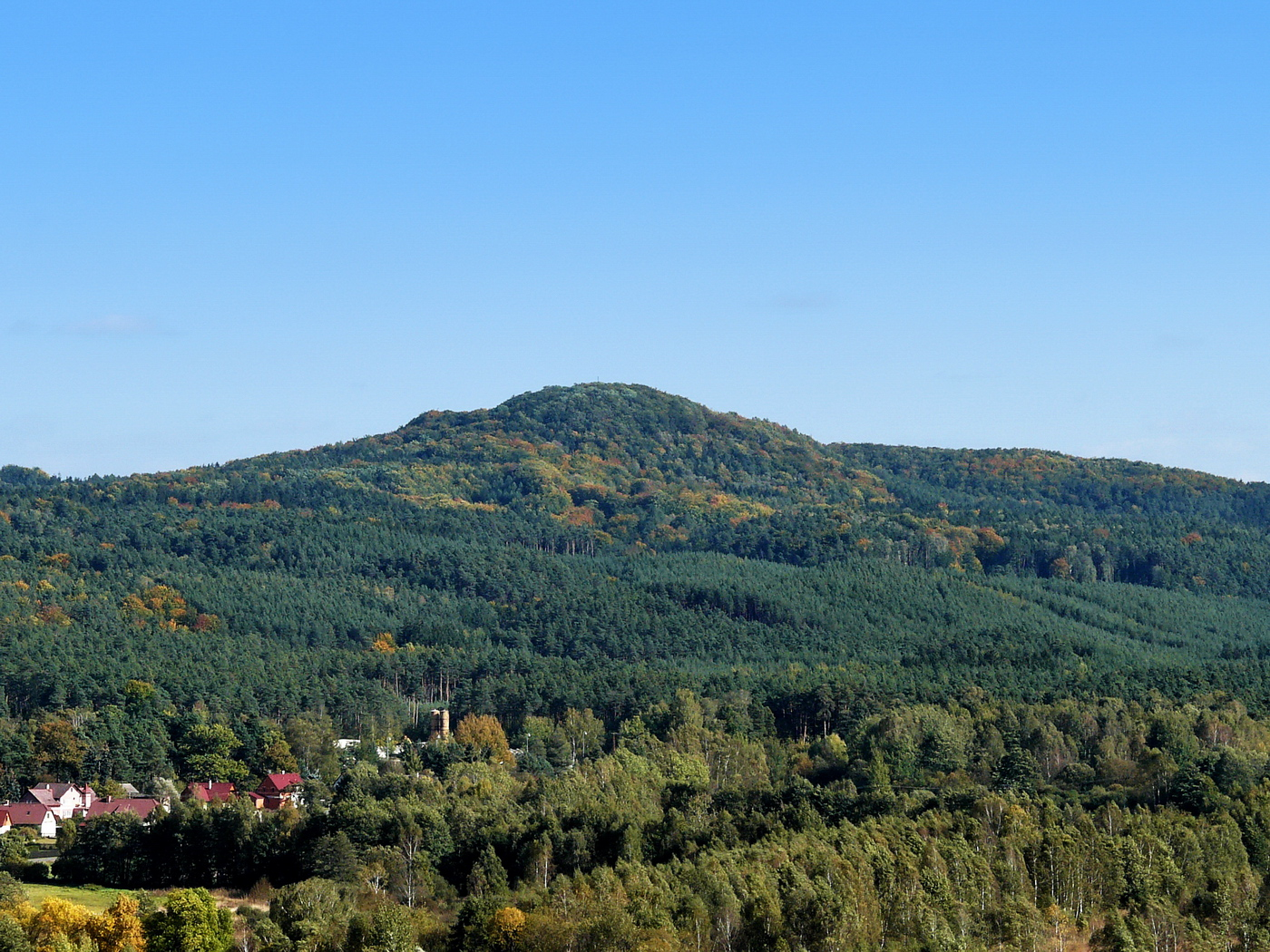 Vrch Dub z hradu Jestřebí